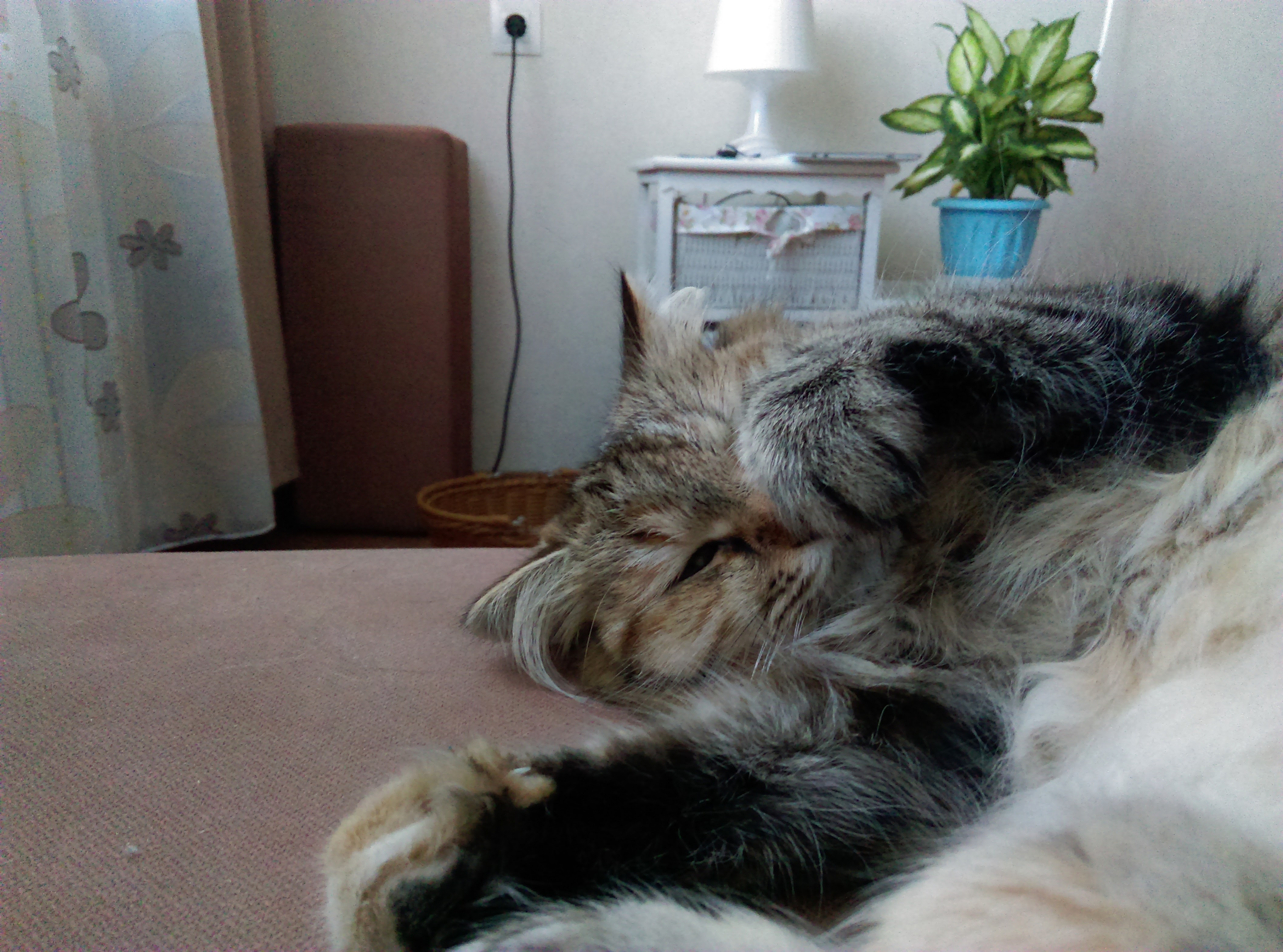 Сибирская кошка